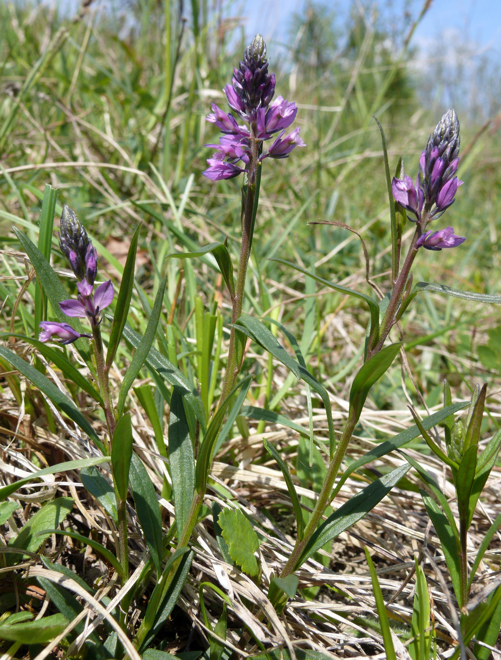 Polygala comosa, Tauberland, Deutschland